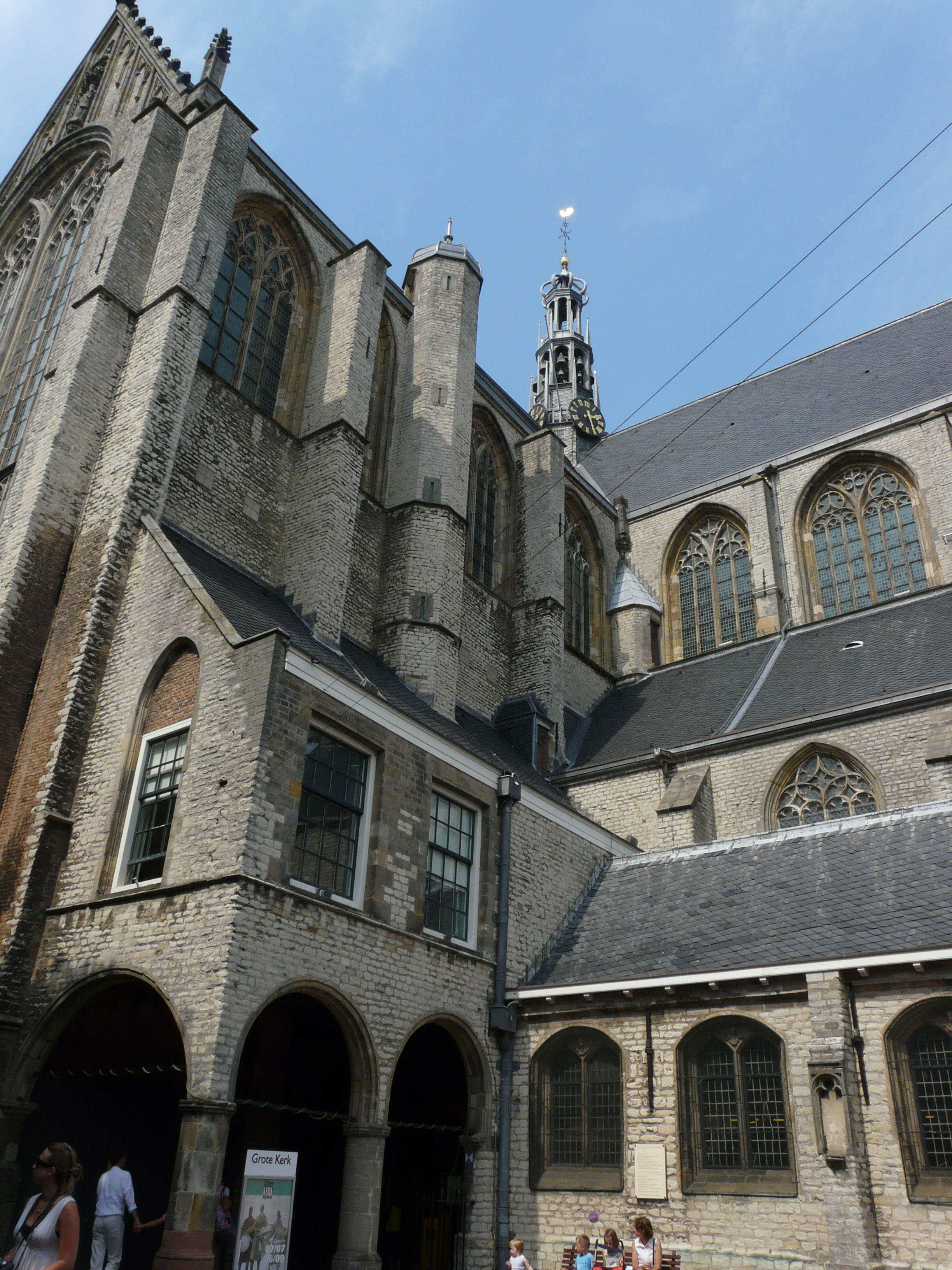 Grote kerk in Alkmaar